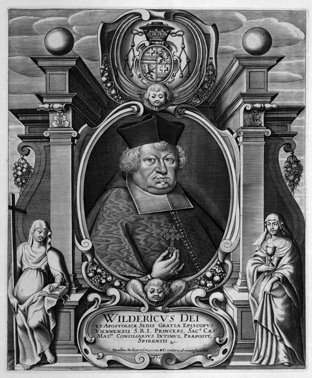 Wilderich von Walderdorff, Bischof von Wien Wilderich von Walderdorff (1617-1680), "Wildericus Dei et Apostolicae Sedis Gratia Episcopus Viennensis S. R. I. Princeps, Sacrae. Caes. Maiestatis Consiliarius Intimus, Praepositus Spirensis &c. Humillime Dedicat et Consecrat M. V. Sommern ad vivum faciebat"